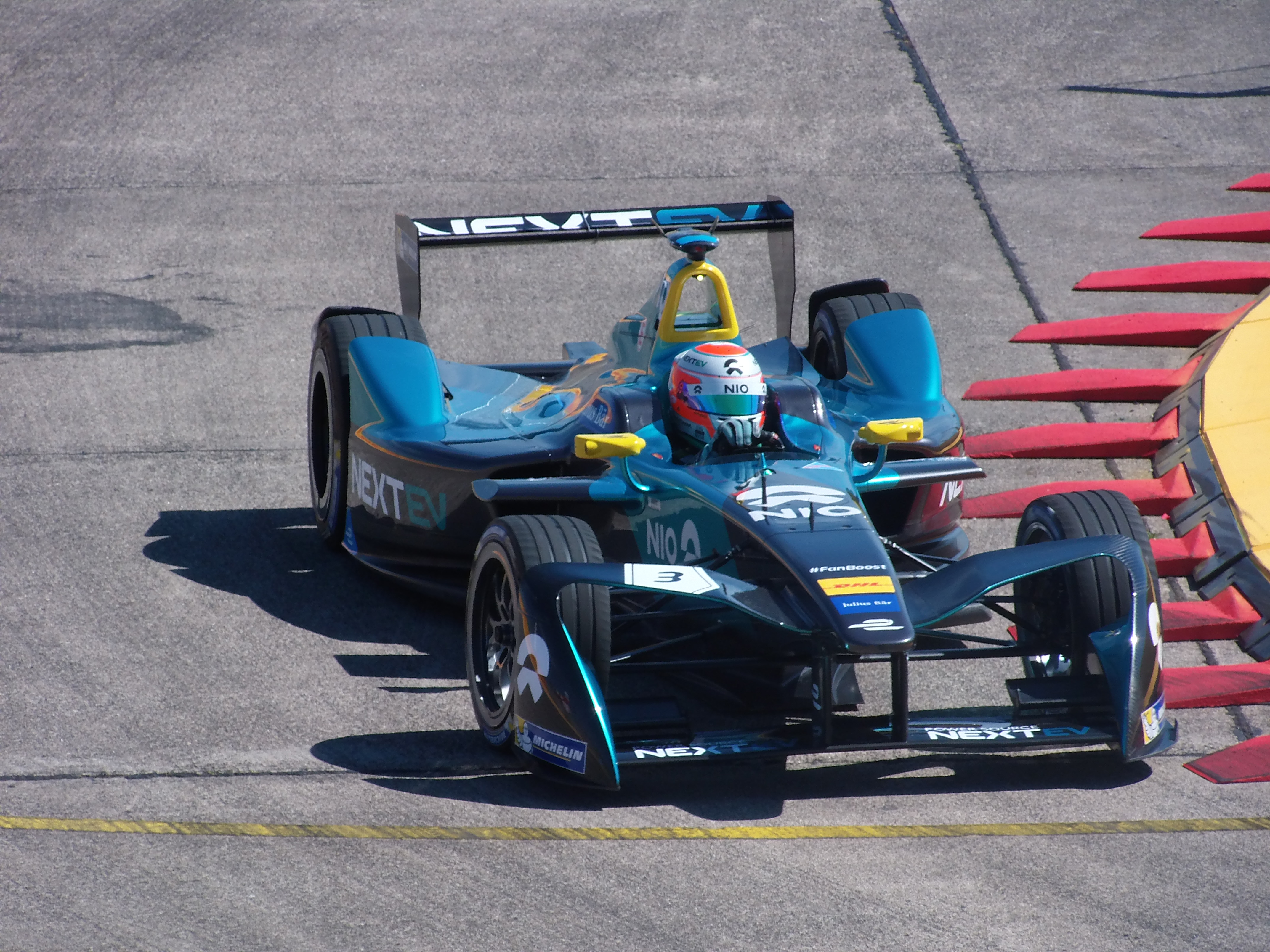 Nelson Piquet qr. (NextEV NIO) beim Berlin ePrix 2017